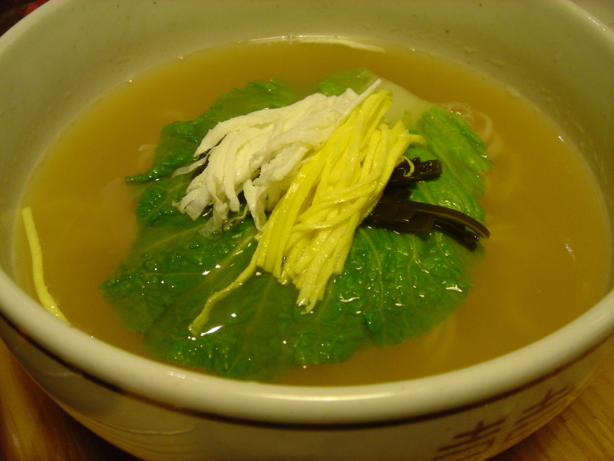 Gomguksu, Korean noodle soup